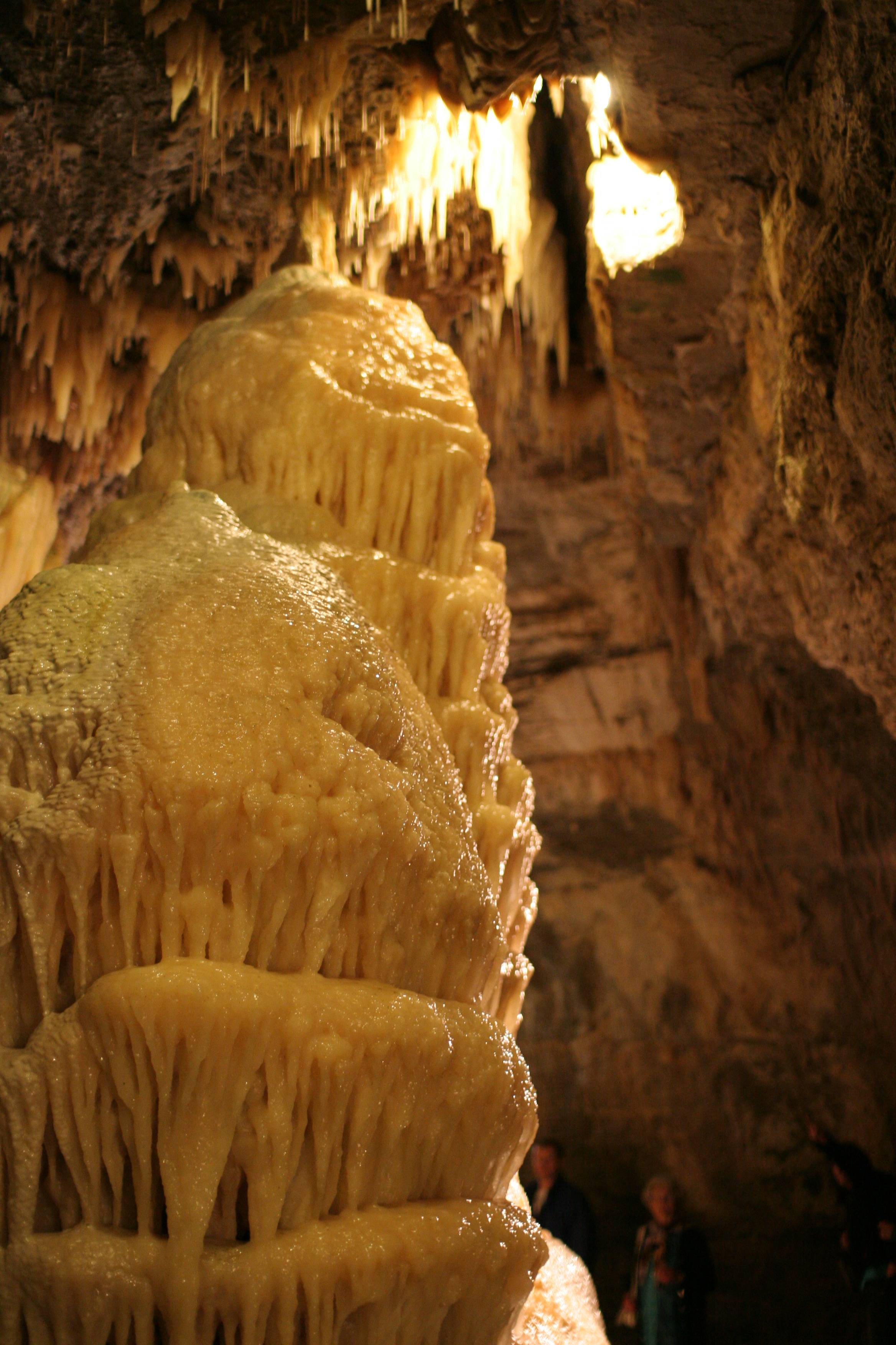 Eberstadter Tropfsteinhöhlen Juni 2006.